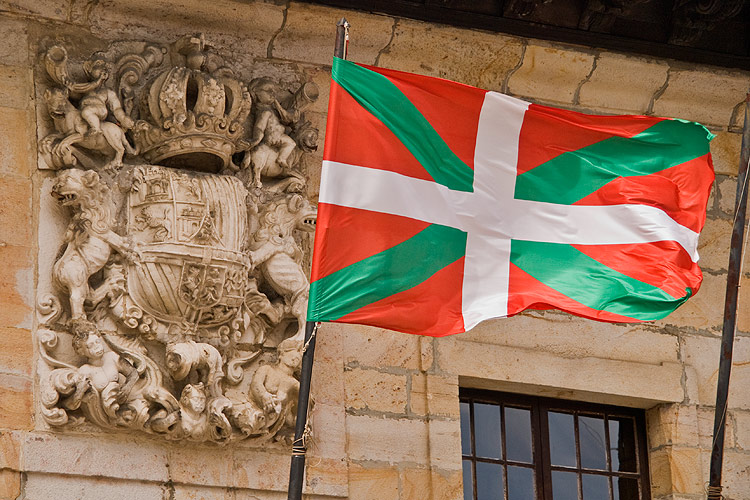 Escudo de la fachada de la casa consistorial de Otxandio